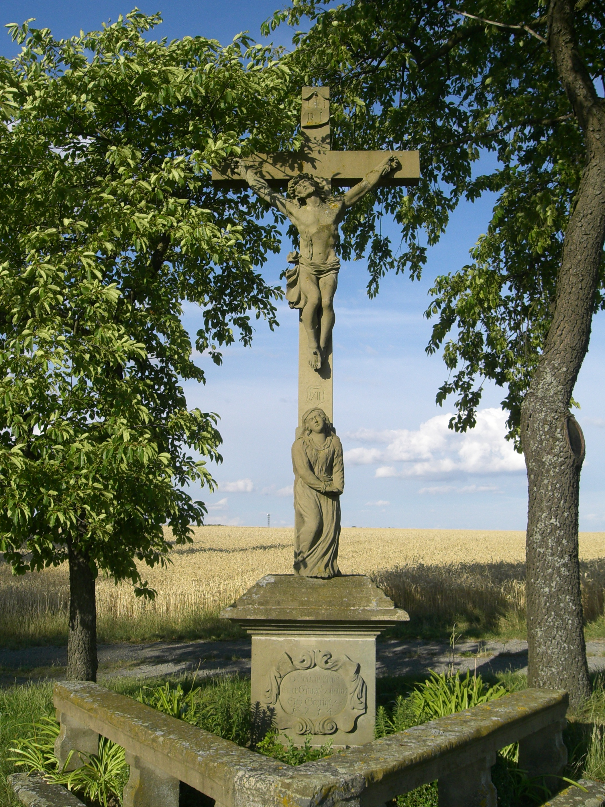 Bildstock in Wülfershausen